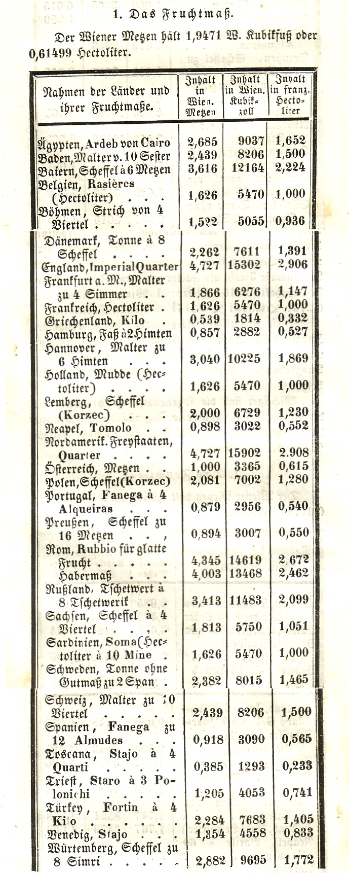 Alte Maßeinheiten / Fruchtmaße